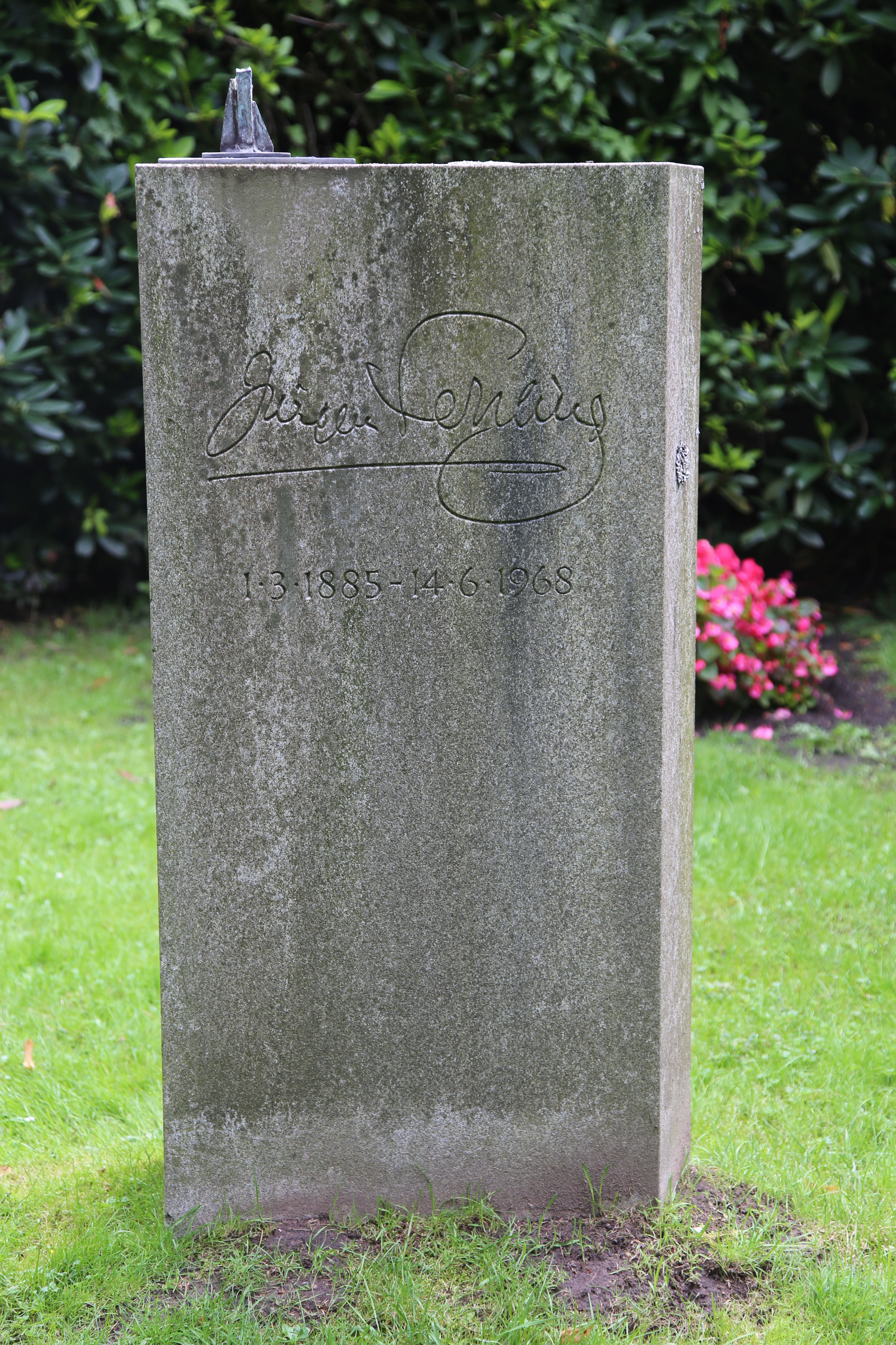 Jürgen Karl Geibel Fehling (* 1. März 1885 in Lübeck; † 14. Juni 1968 in Hamburg) war ein deutscher Theaterregisseur und Schauspieler.